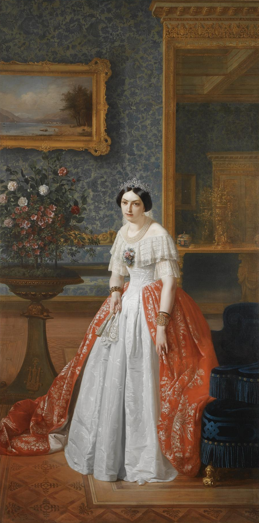 Ritratto di S.M. Maria Adelaide d' Asburgo